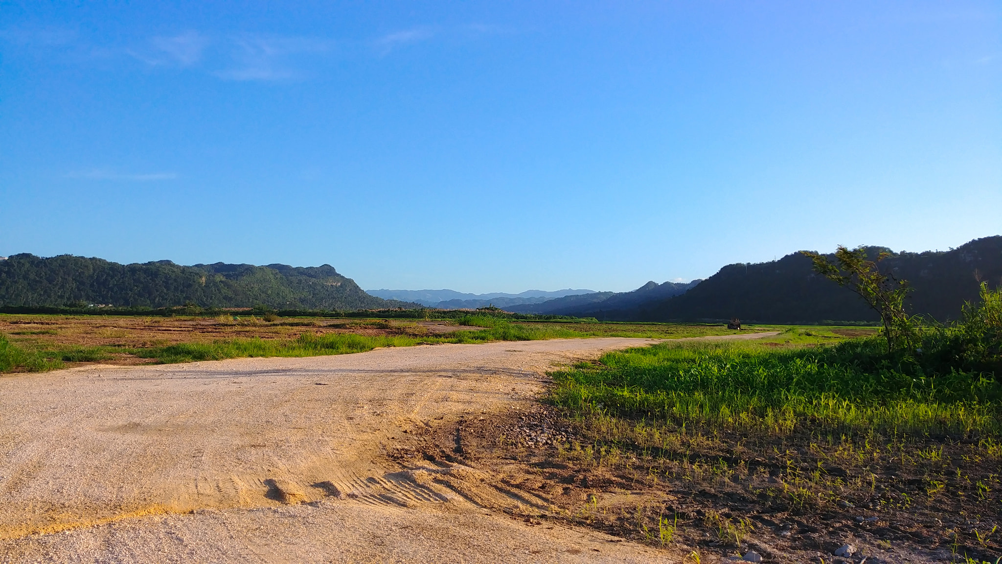 Barrio Bajura Afuera, Manatí, Puerto Rico (2019)